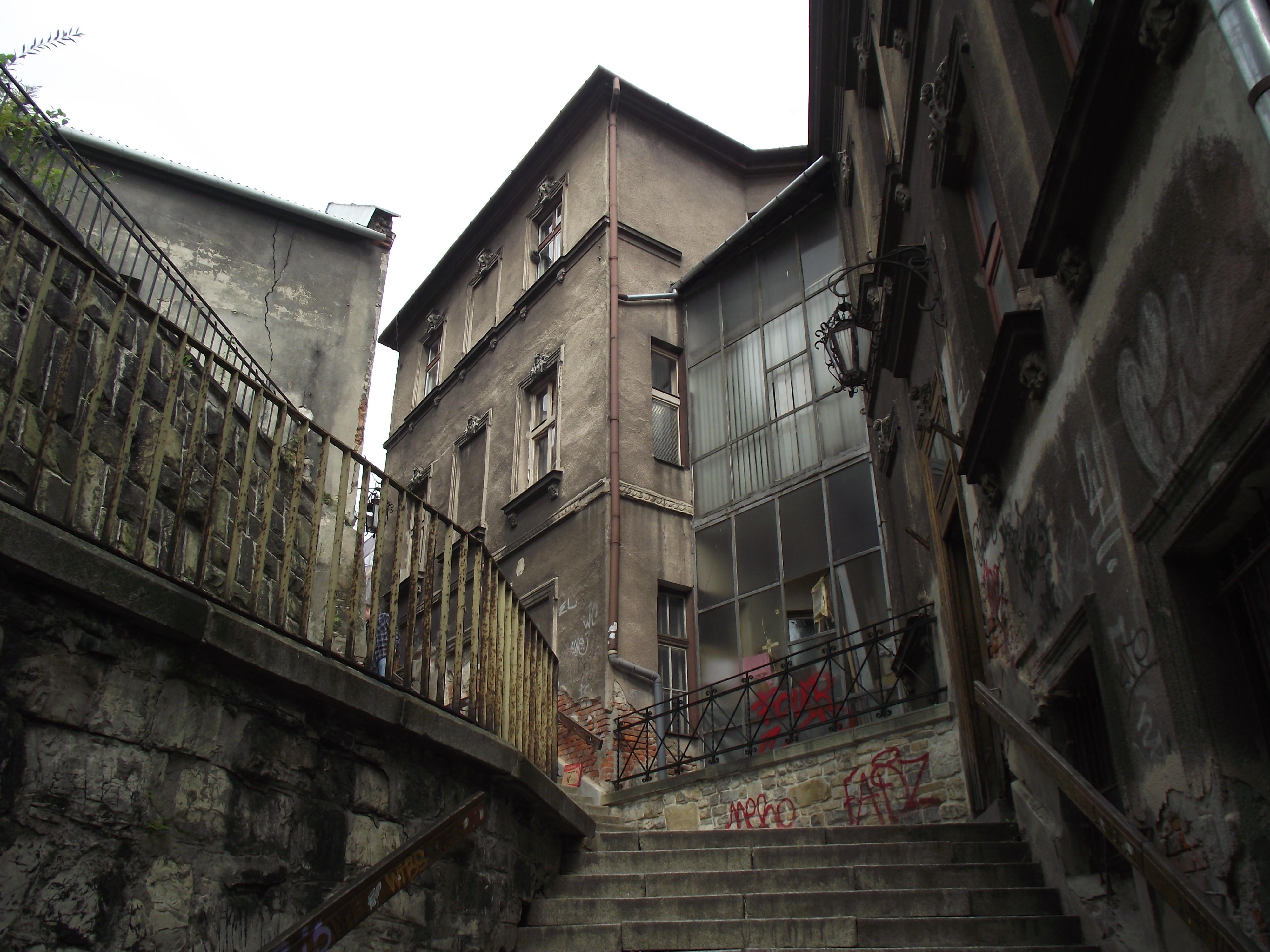 Bielsko-Biała, ulica Schodowa.